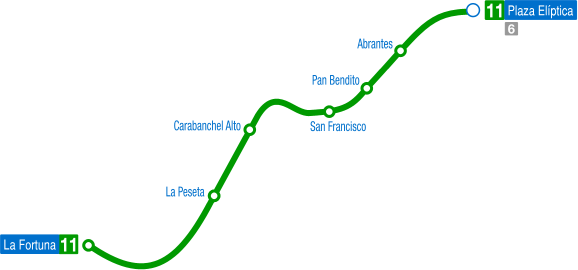 Recorrido de la línea 11 del Metro de Madrid